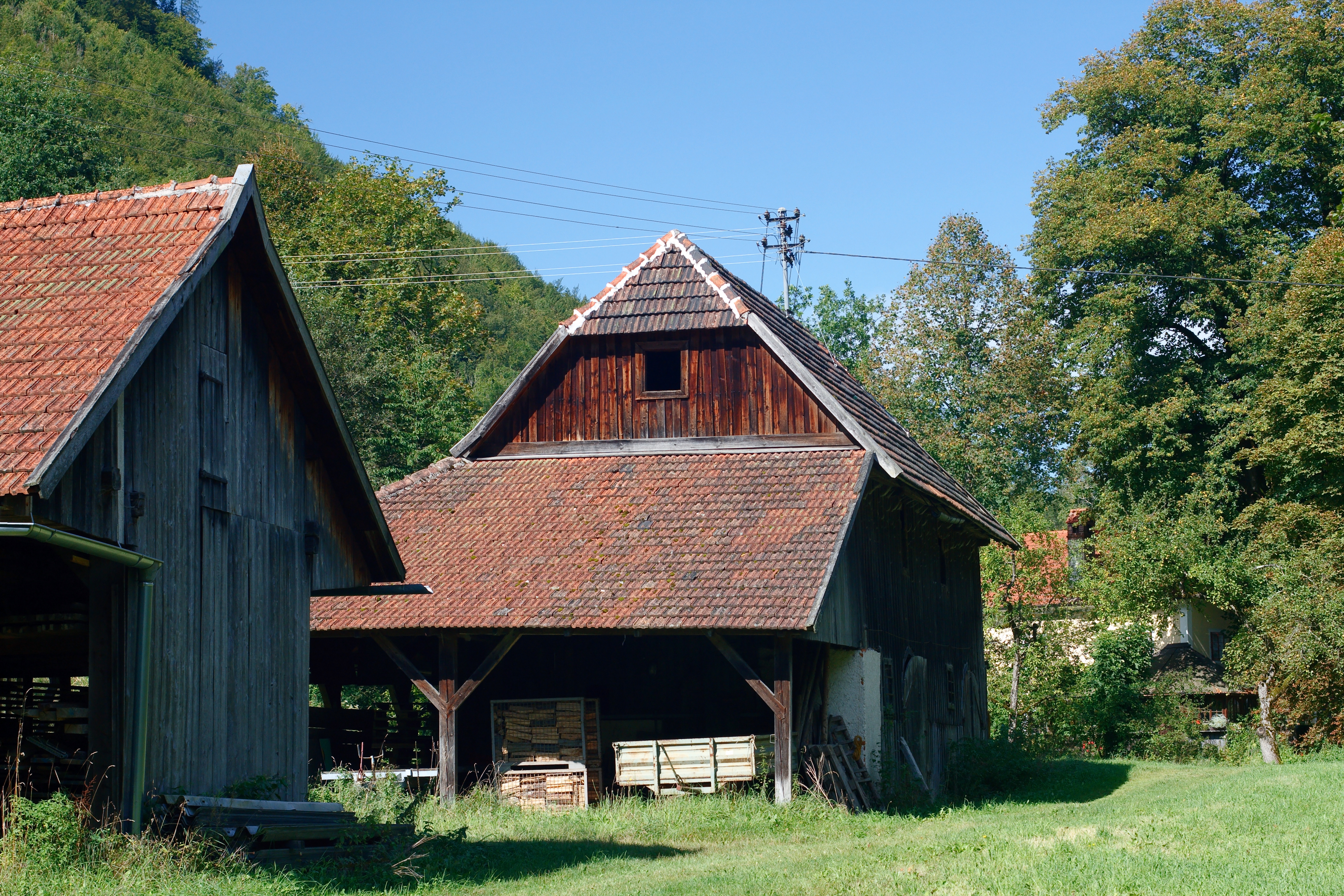 Die Scheiterhütte im Ensemble Schmiedleithen (Grünburg, Oberösterreich)